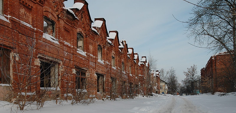 Кимры. Торговые ряды